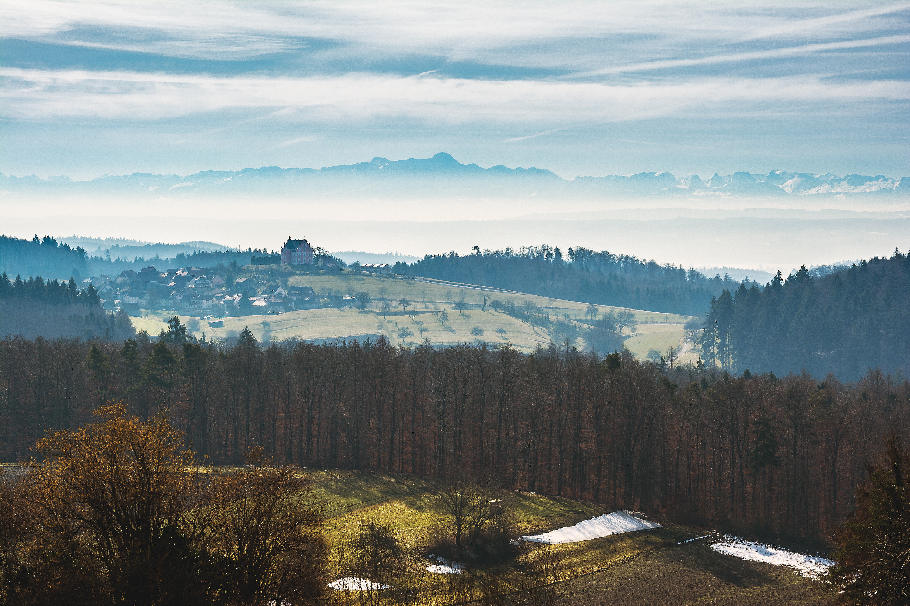 Blick auf Schloss Freudental von Langenrain aus mit Alpenpanorama im Hintergrund.